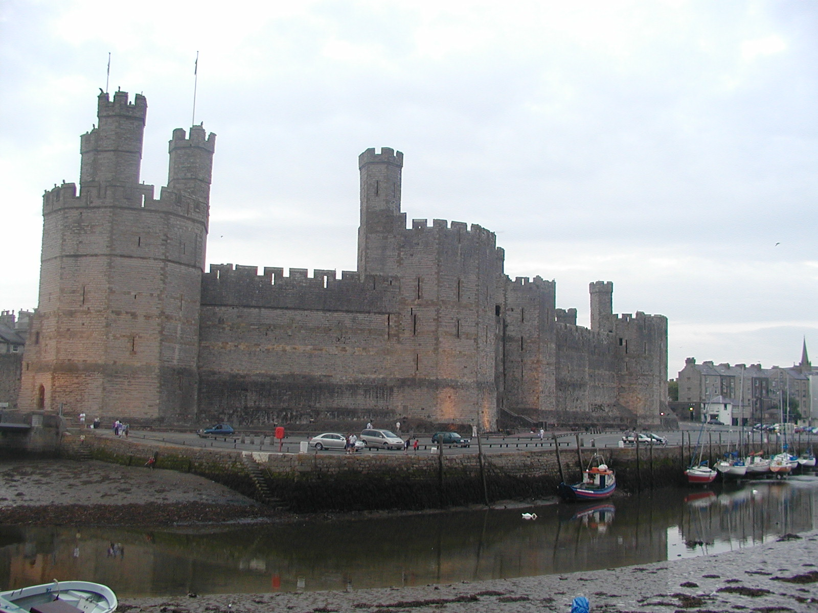 Castell Caernarfon